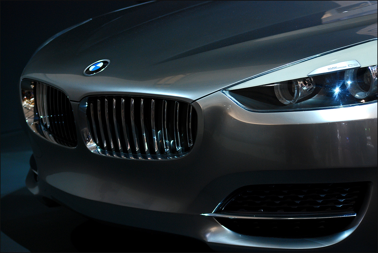 BMW Concept CS